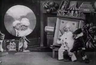 photo du film "La lanterne magique" (1903, Méliès)